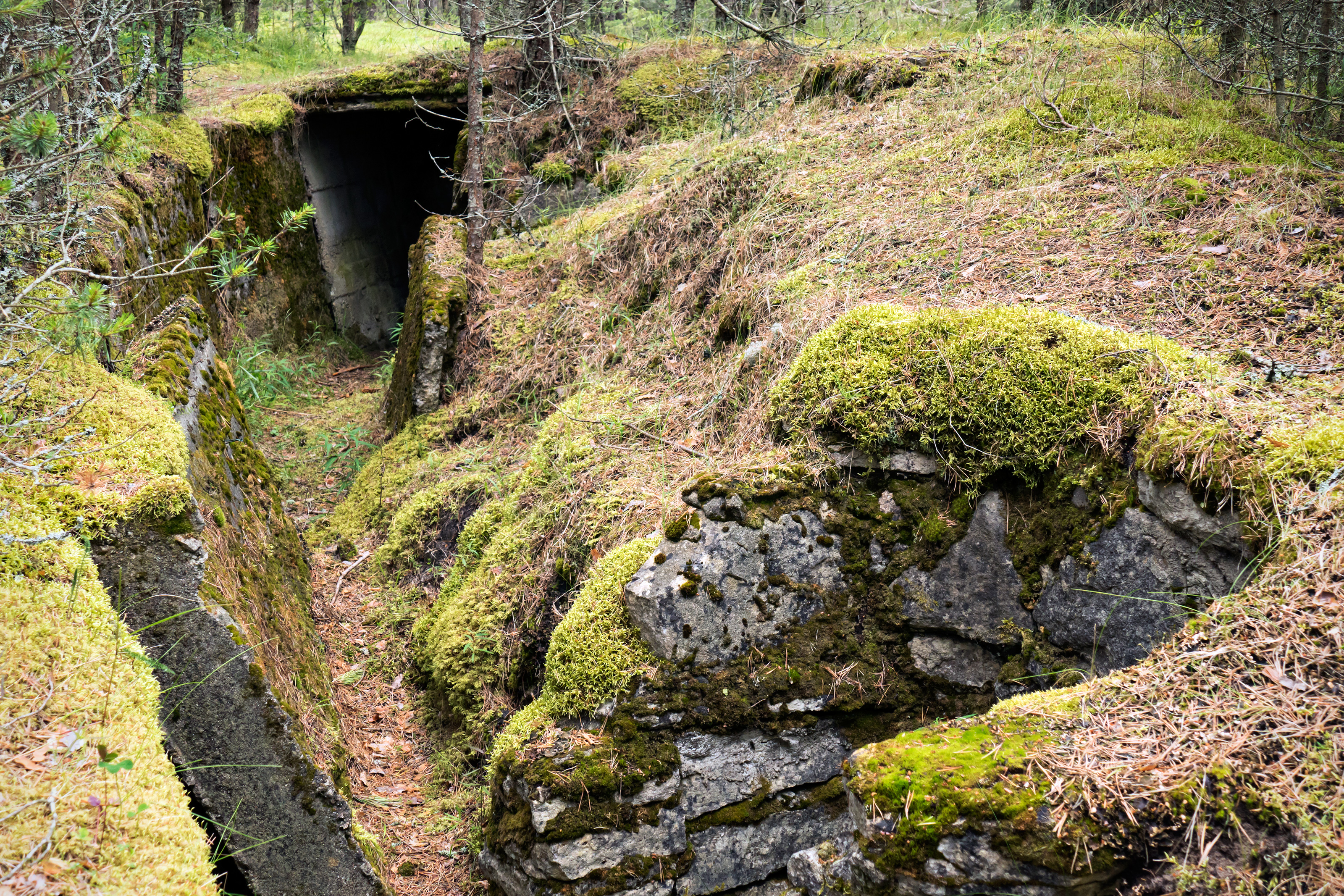 Kaitsekraav Tahkuna poolsaarel, Kukeraba kaitsepatarei juhtimiskeskuse lähedal.